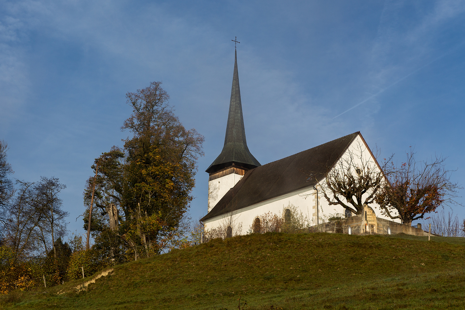 Eglise à Chaindon, Reconvilier (BE)